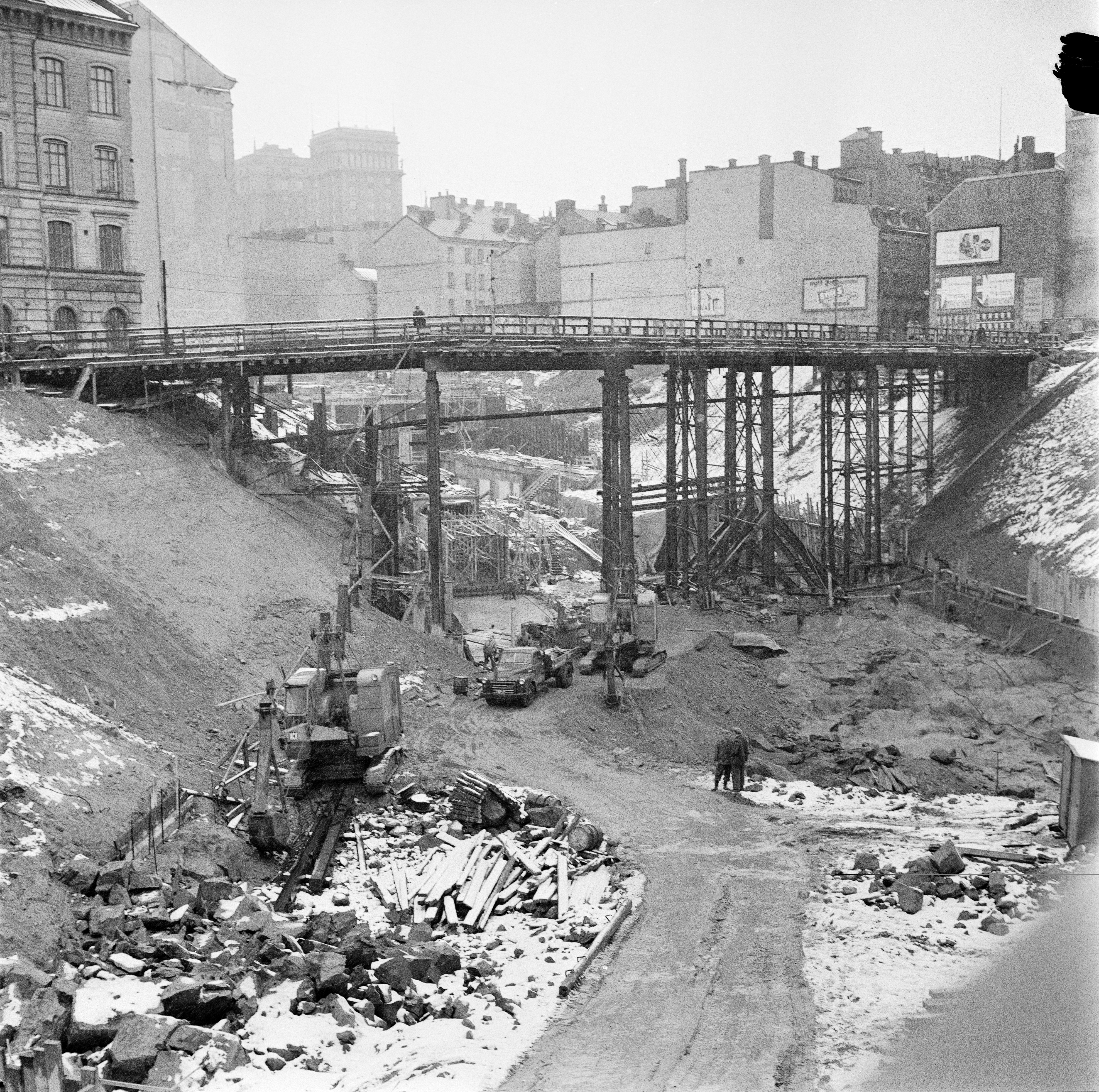 Rivning och tunnelbanebygge kring blivande Sergels Torg. Mäster Samuelsgatan går över tillfällig bro. Längst t.v. hörnet av Konstfackskolan. I fonden kvarteret Putten